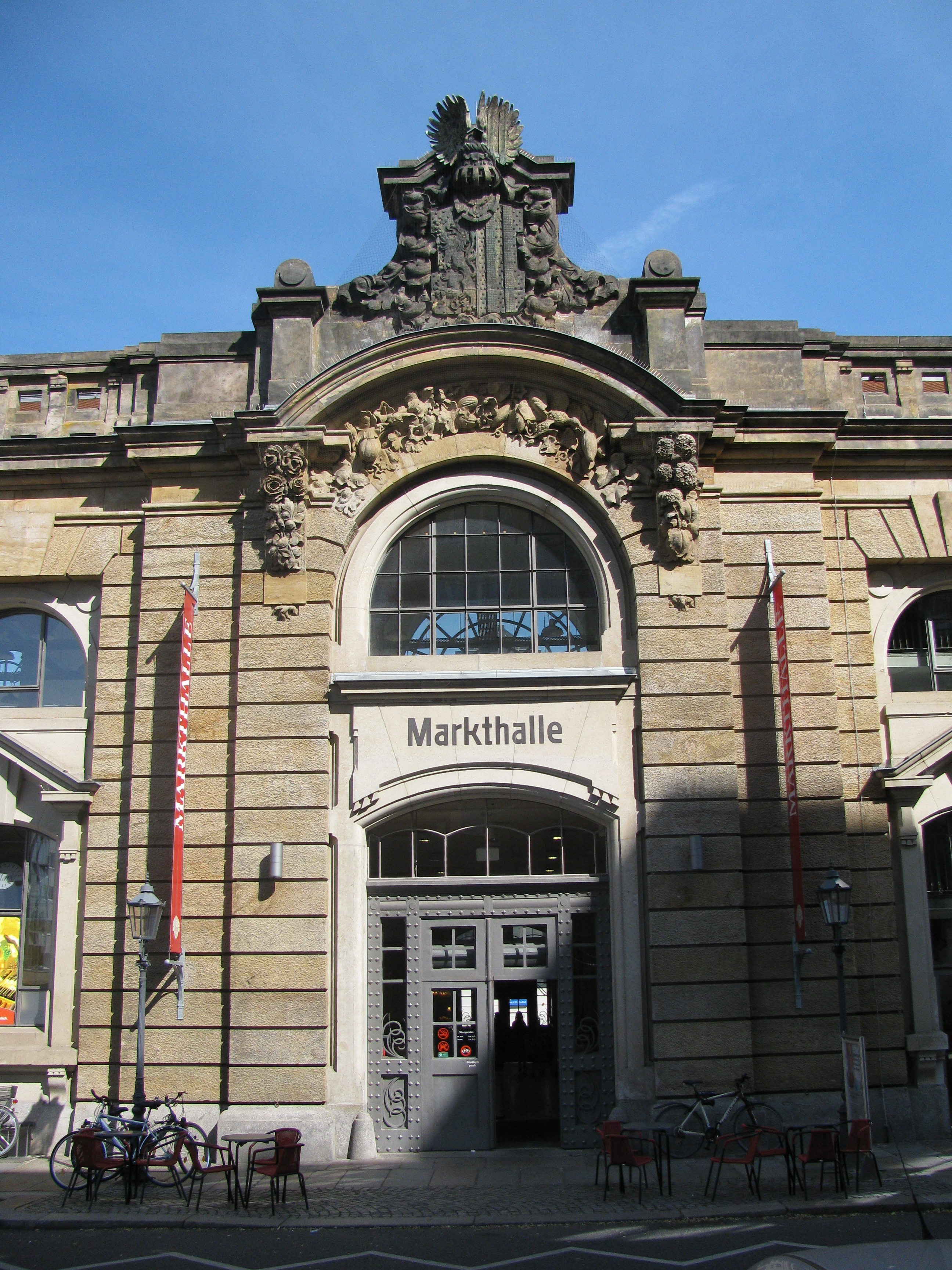 Neustädter Markthalle, Innere Neustadt, Dresden. Portal an der Ritterstraße.